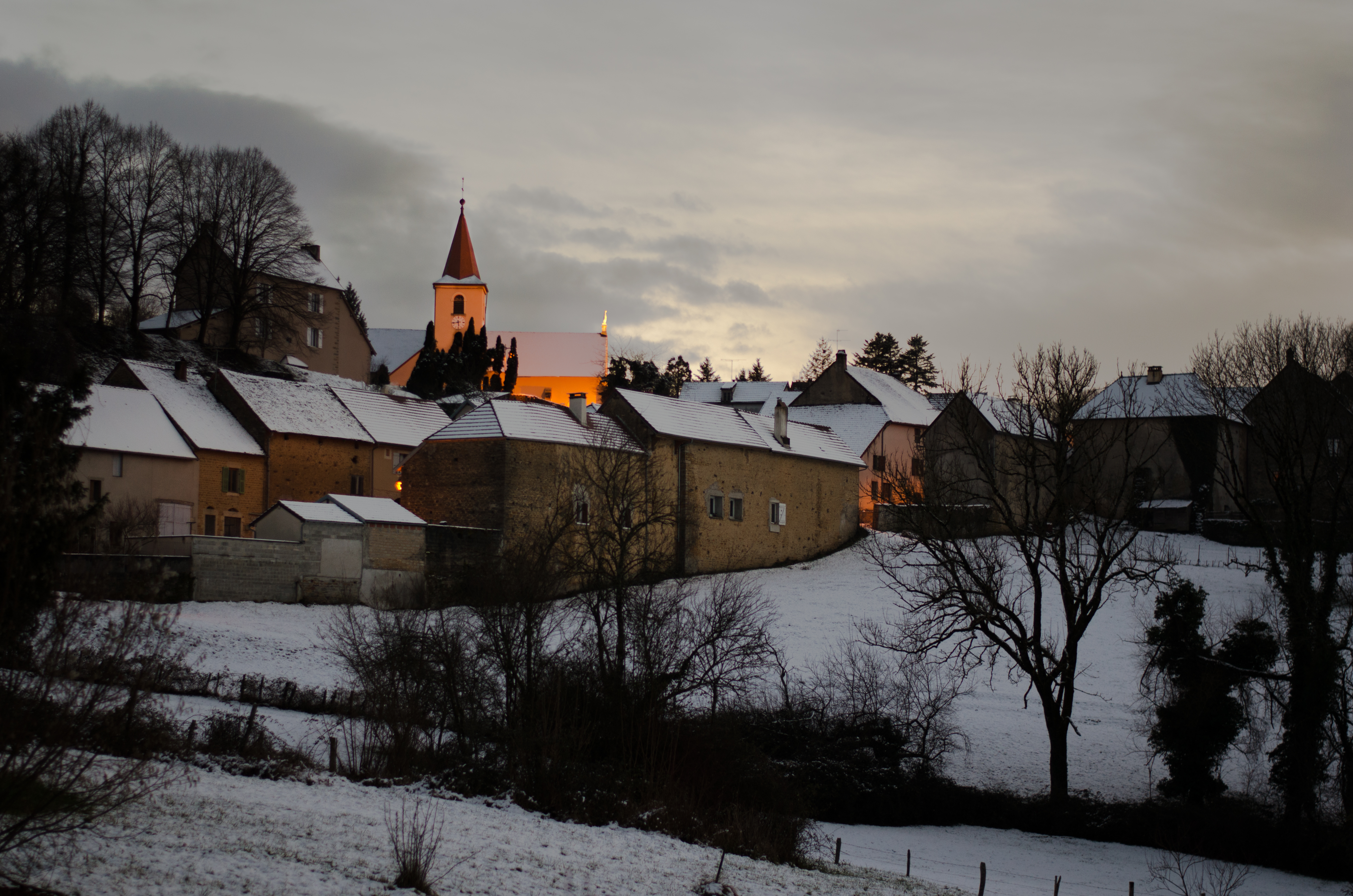 Vue de Mantry au soleil couchant.